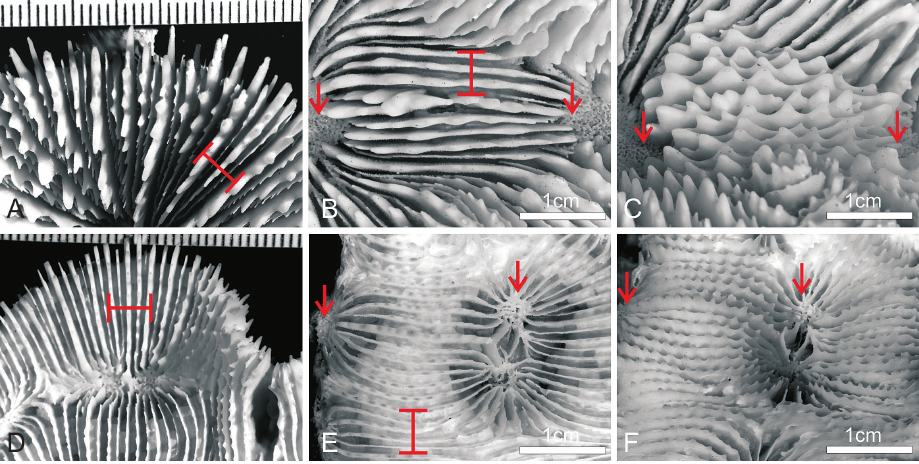 Parascolymia vitiensis (A-C) y P. rowleyensis (D-E): A) septa en espécimen monocéntrico; B) vista de los costosepta en espécimen policéntrico; C) vista lateral de la misma porción del espécimen B; D) cálices periféricos de un espécimen; E) vista de los costosepta en espécimen D; F) vista lateral de la misma porción del espécimen E. Flechas rojas indican la posición de la columella en coralitos adyacentes, corchetes rojos situados perpendicularmente a los costosepta muestran el número de costosepta interceptados en 1 cm de transección. Roberto Arrigoni et al. (2014) (en inglés) Taxonomy and phylogenetic relationships of the coral genera Australomussa and Parascolymia (Scleractinia, Lobophylliidae). Contributions to Zoology, 83 (3) pp 195-215. Disponible en línea en